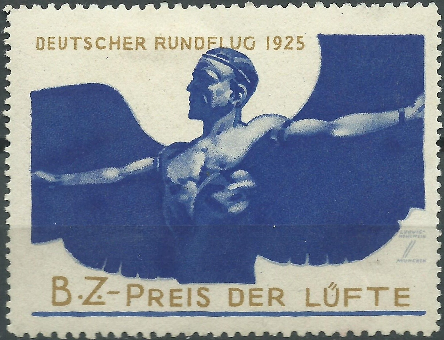 Ludwig Hohlwein: BZ-Preis der Lüfte. Deutscher Rundflug 1925